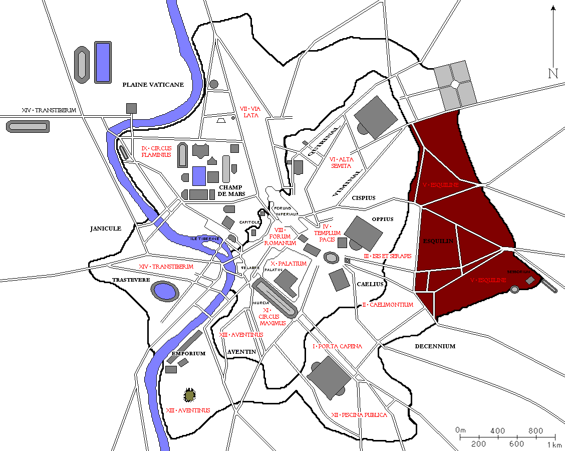 Plan de Rome avec la cinquième région des 14 régions d'Auguste